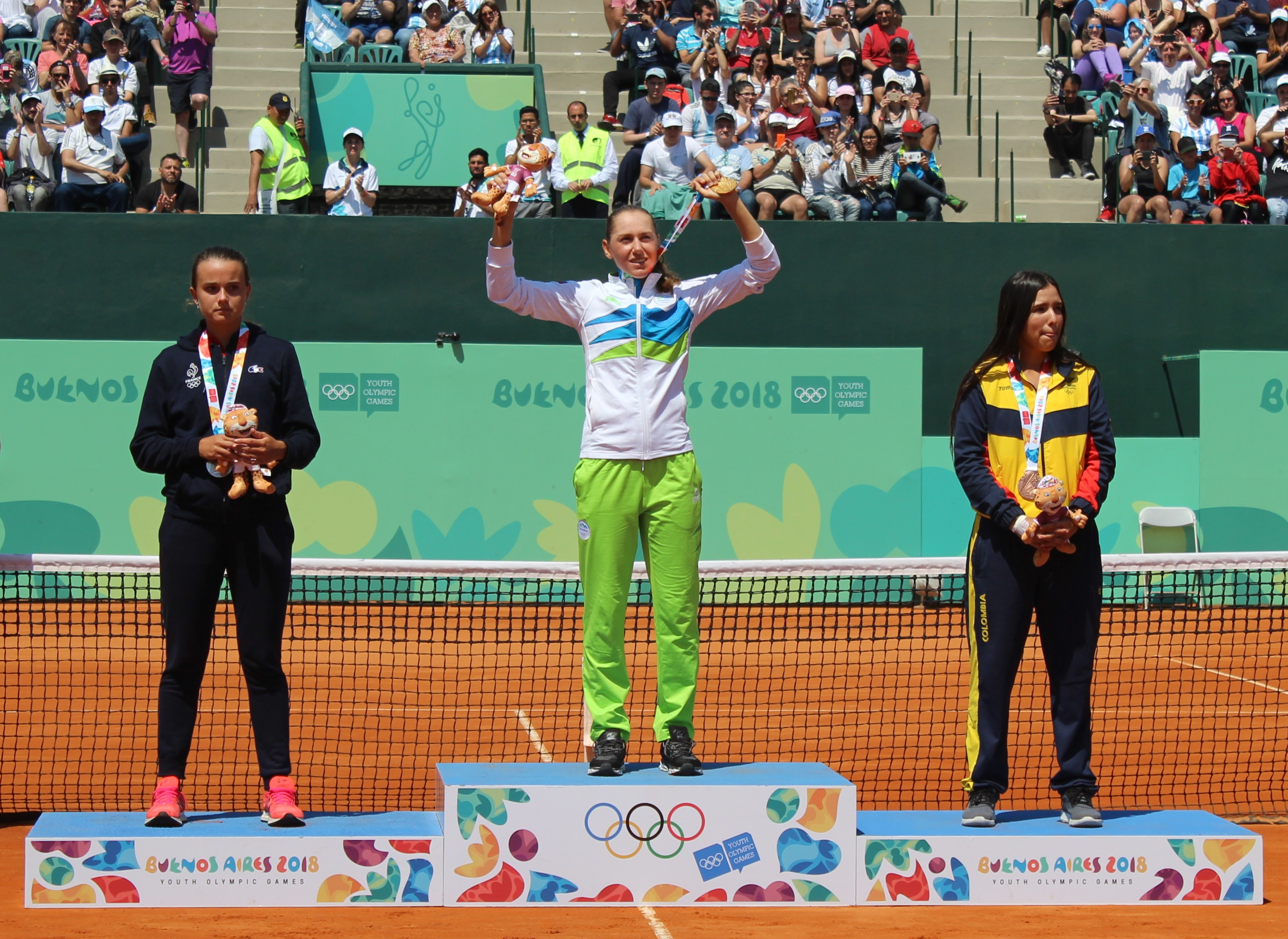 JJOO de la Juventud Buenos Aires 2018